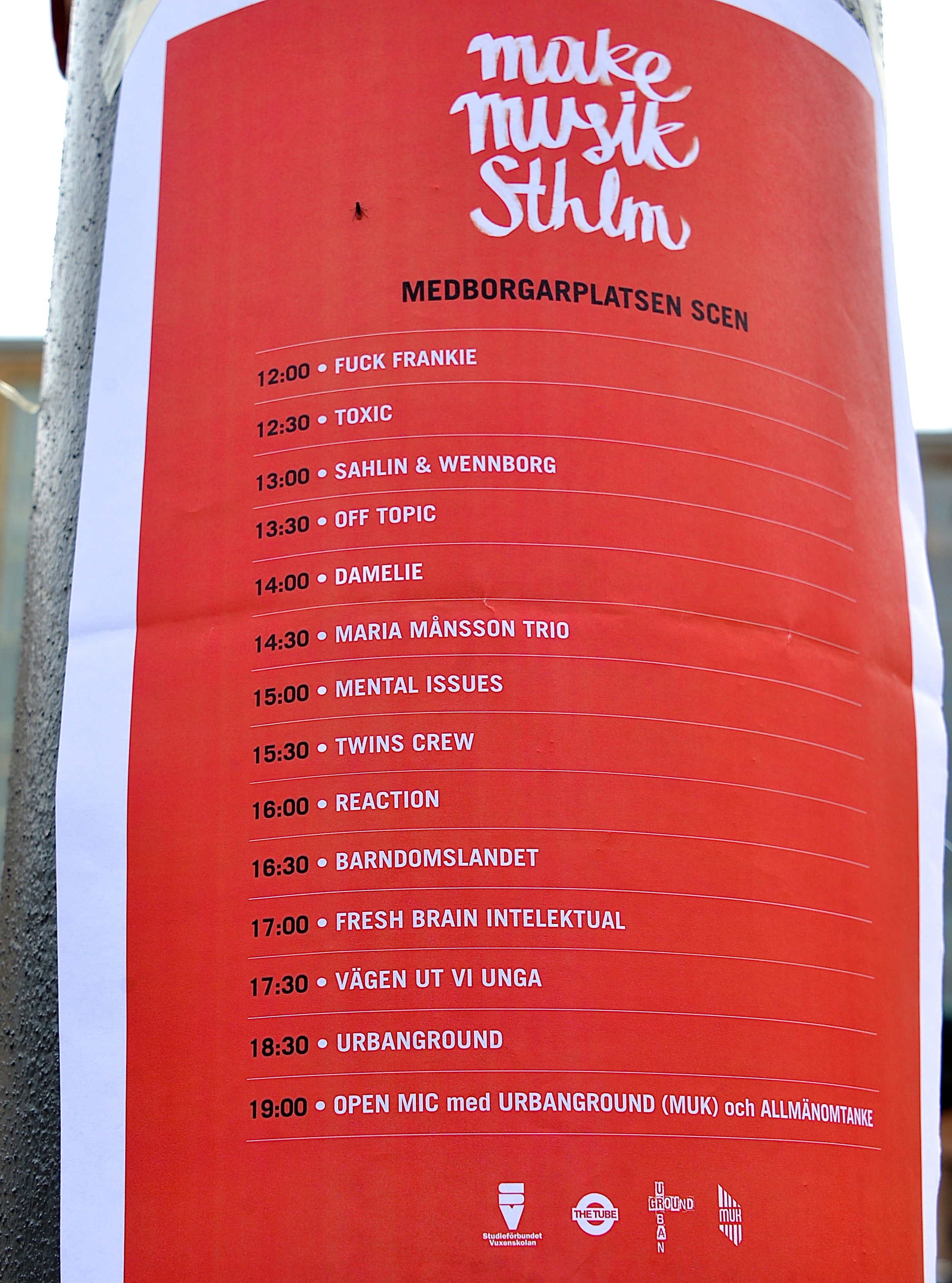 "Make Musik Sthlm" på Medborgarplatsen i Stockholm den 6 juni 2014.